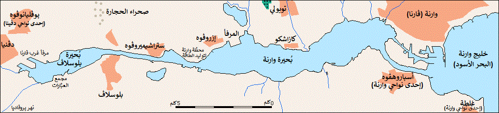 خريطة لِبُحيرة ڤارنا وما يُحيطُ بها.